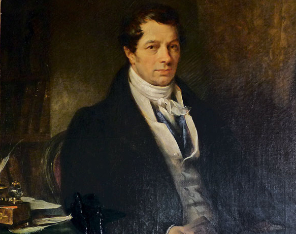 Jean-Baptiste Say (1767-1832)